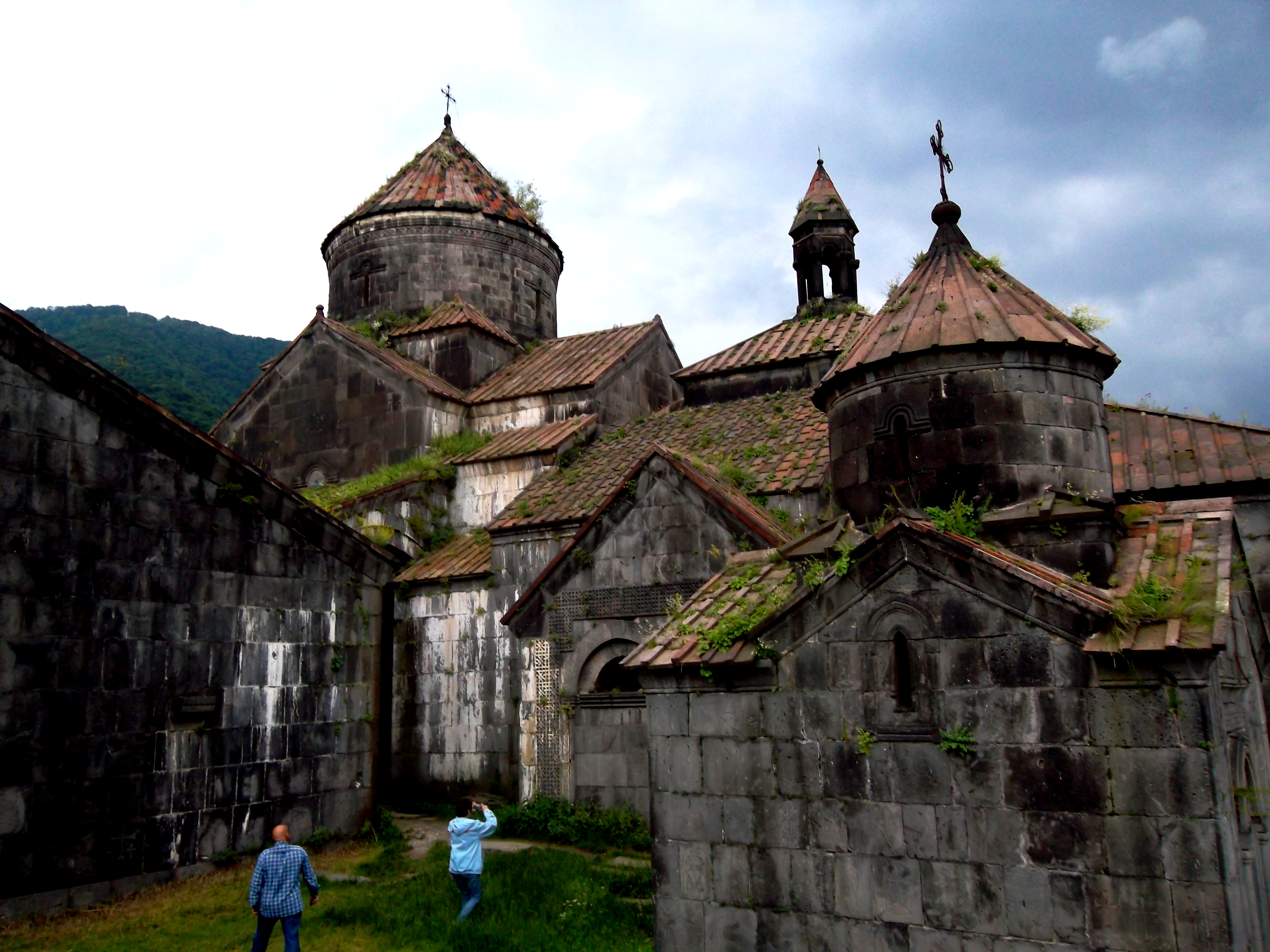 Հաղպատավանք, հայկական ճարտարապետական անսամբլ, խոշոր վանքային համալիր ՀՀ Լոռու մարզի Հաղպատ գյուղում։ 60/33